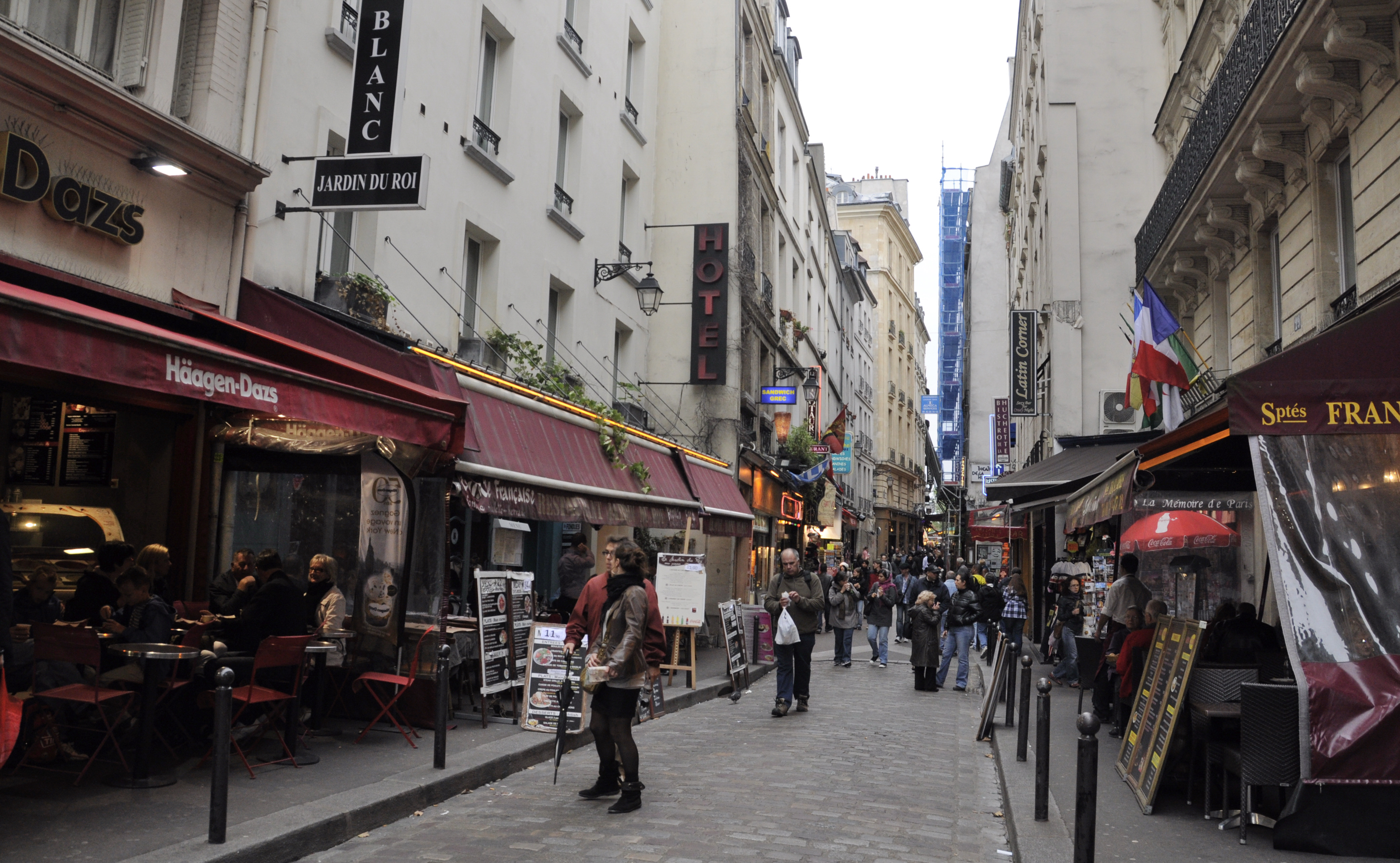 Rue de la Huchette (Paris)